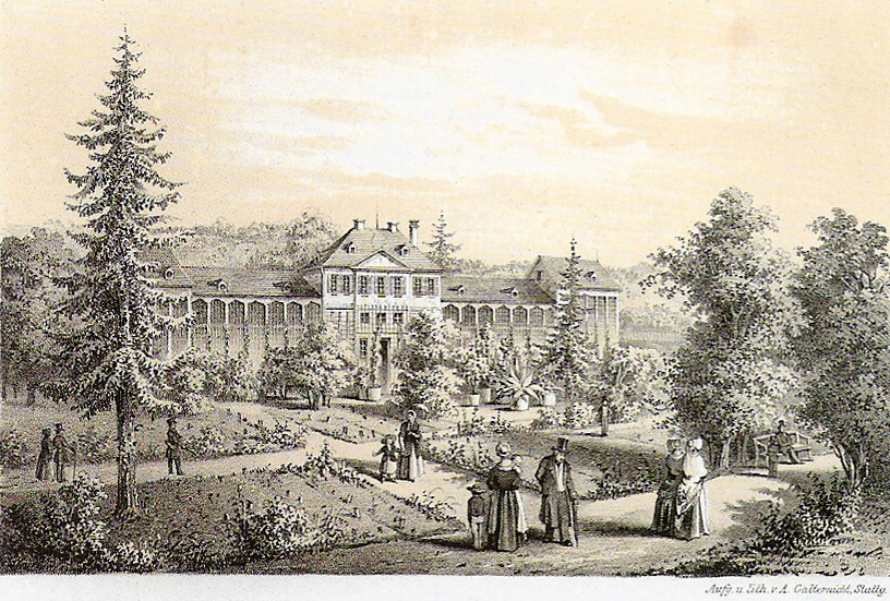 Der Botanische Garten in Tübingen mit Blick auf die Orangerie (Lithographie aus „Erinnerung an Tübingen“ 11,6 × 18,0 cm; Blatt 19,0 × 24,6 cm); Schefold 9447C